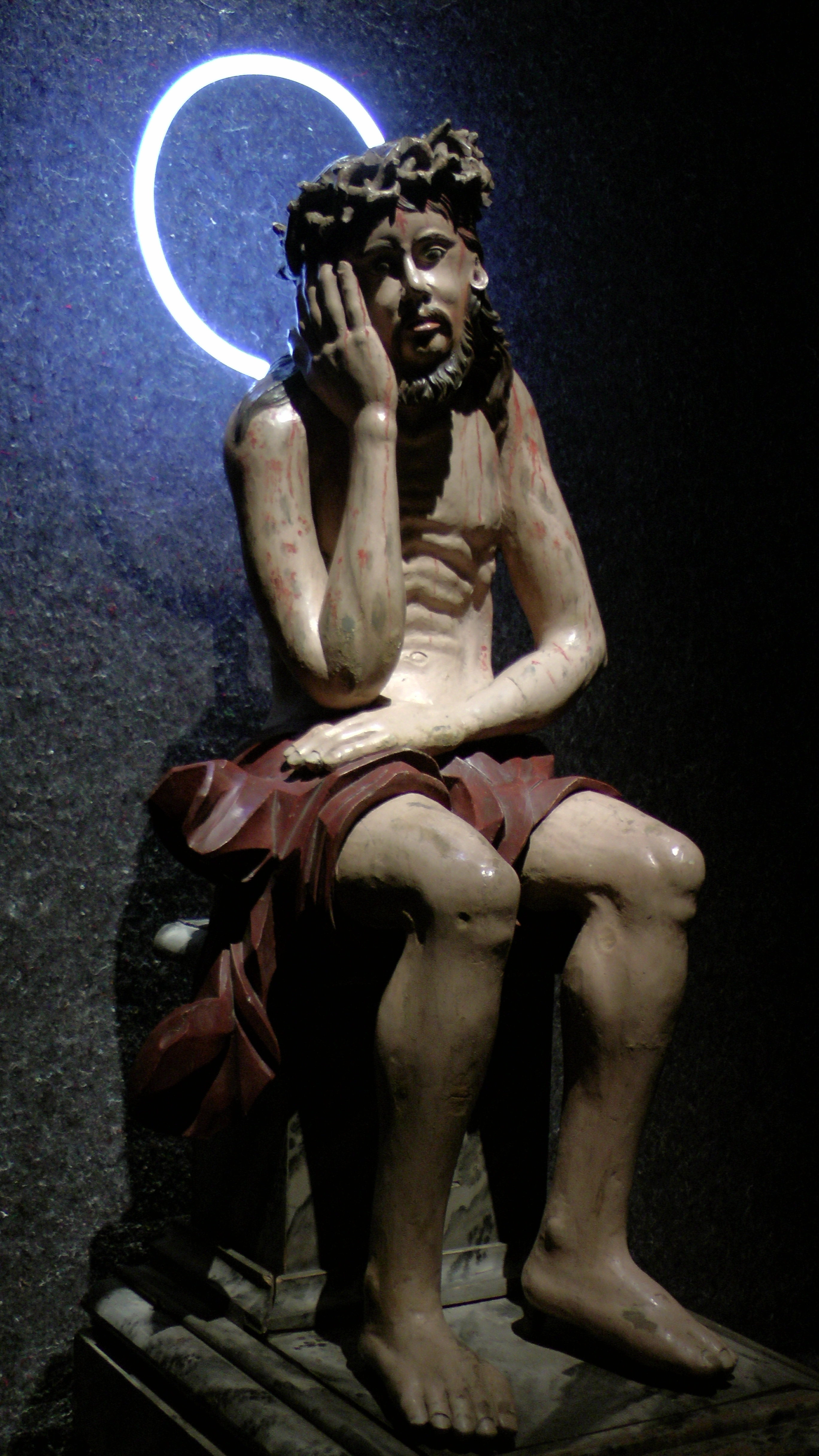 Христос в темнице. Каргопольский музей, конец XVIII — начало XIX века. Дерево, левкас, масло, железо, резьба, роспись. Поступил в 1929 году из Спасо-Преображенского мужского монастыря Каргополя. Фотография сделана на выставке "Христос в темнице" в Санкт-Петербурге.